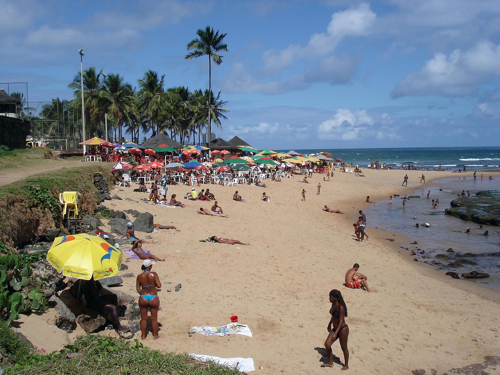 Praia de Ondina, Ondina, Salvador, Bahia, Brasil.Ondina